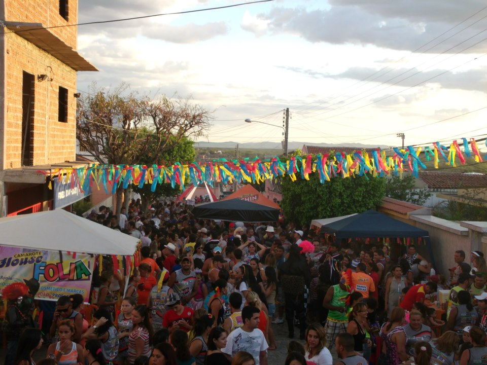 Bloco SportFolia - Ano III